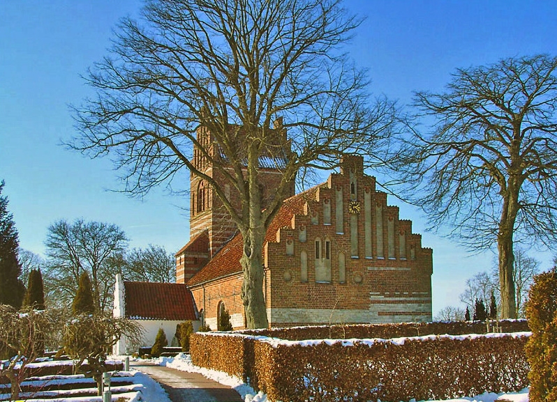 Borup kirke, Køge, fra sydøst